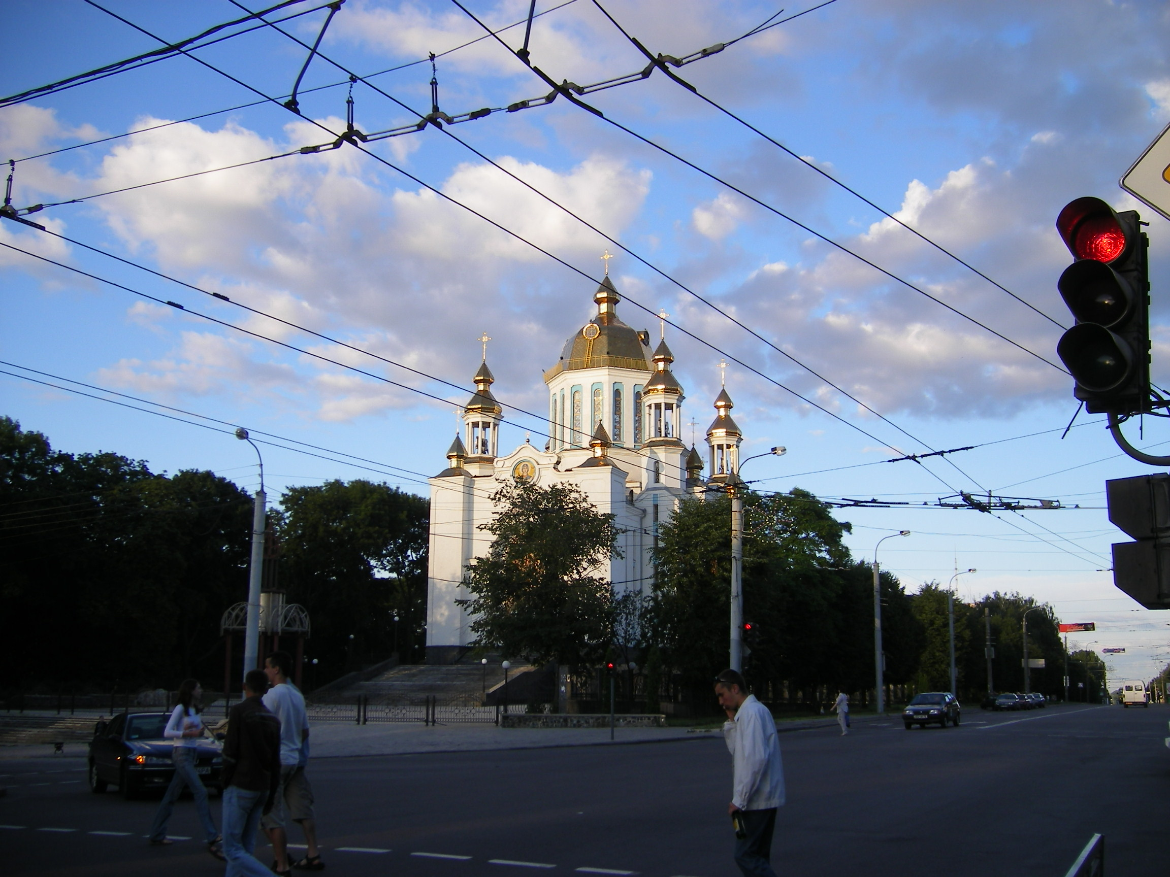 Rivne, Pokrovskyy Church